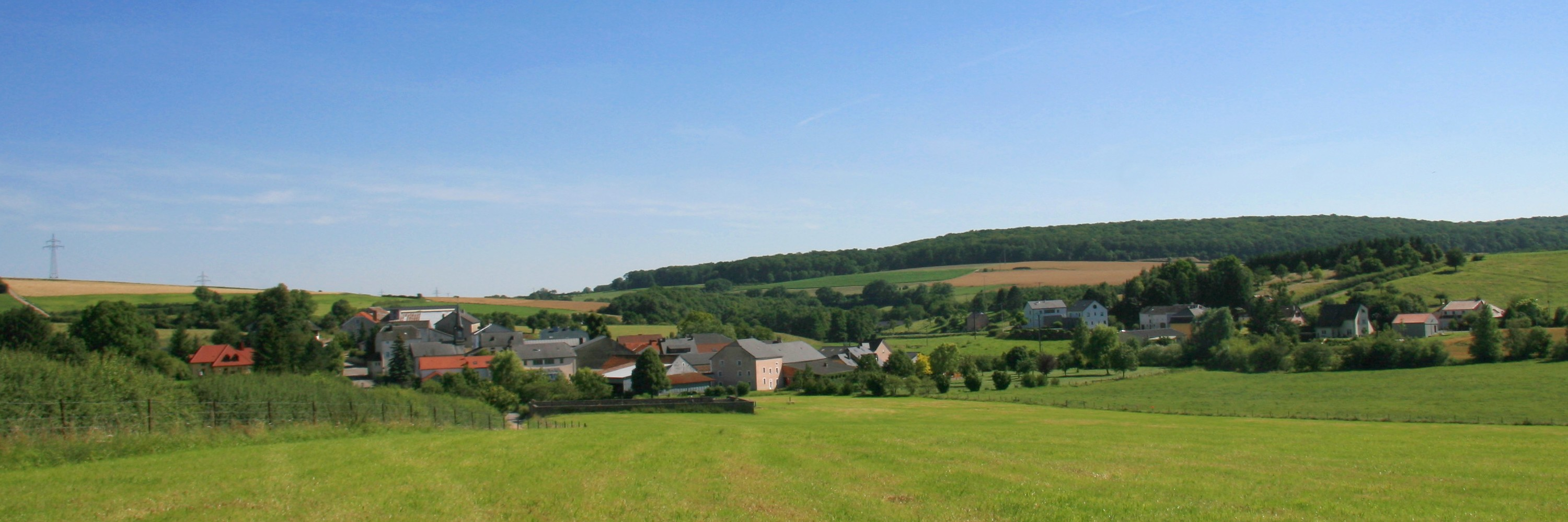 Buddeler - Panorama - user Ioni